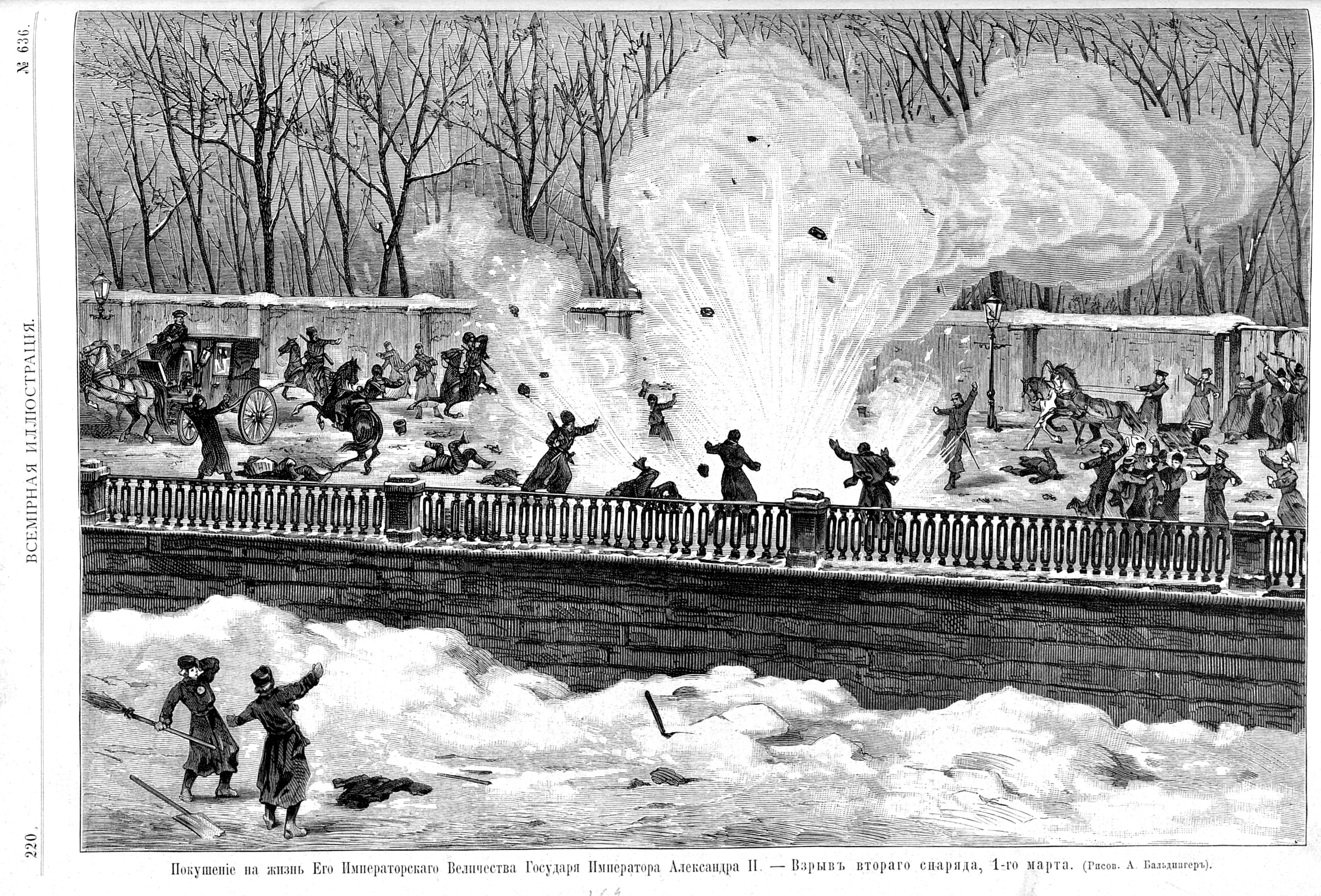 Покушение на жизнь Александра II 1 марта 1881 года - взрыв второго снаряда. Из Журнала "Всемирная иллюстрация" от 14 марта 1881 г.